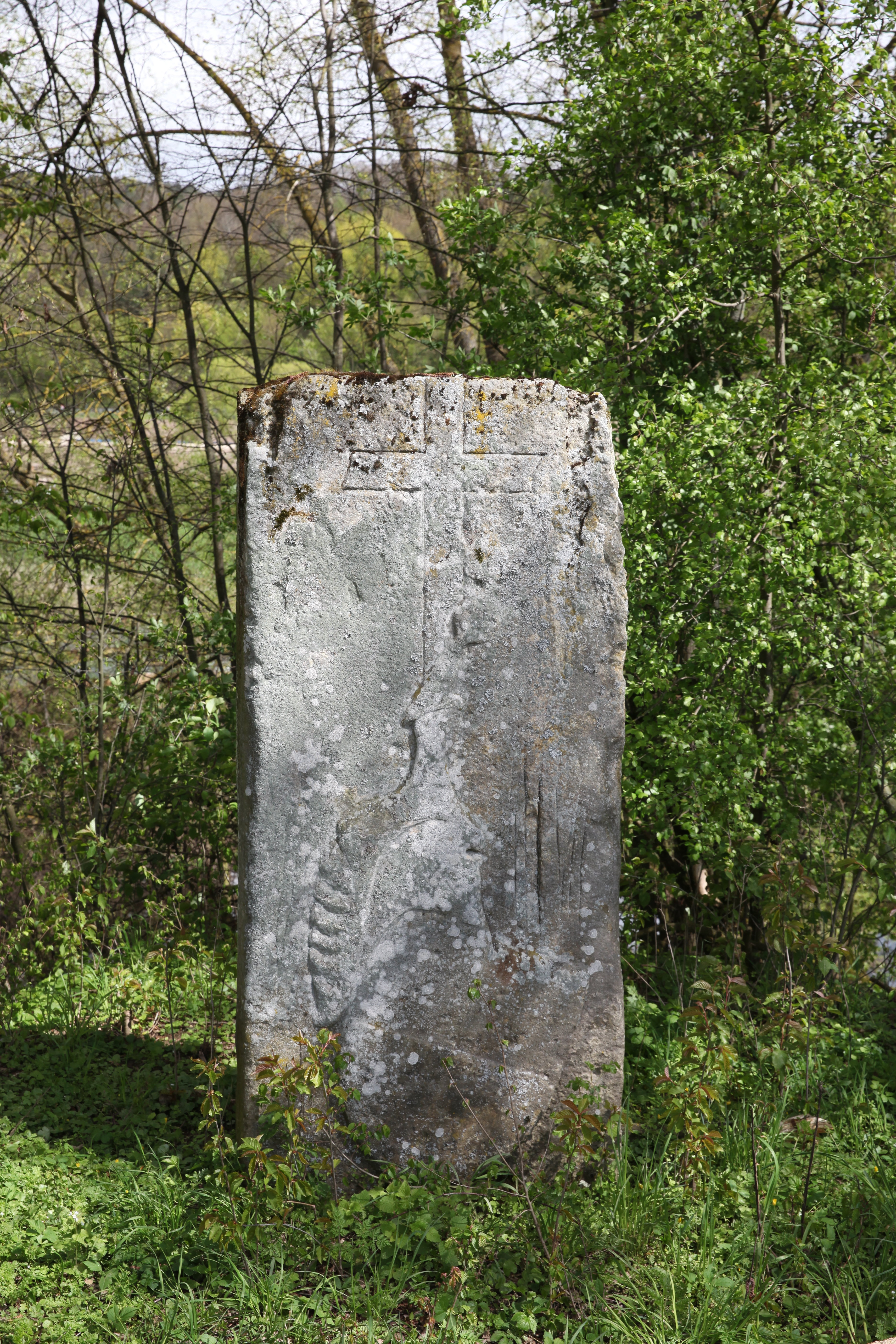 Kreuzstein bei Ebing